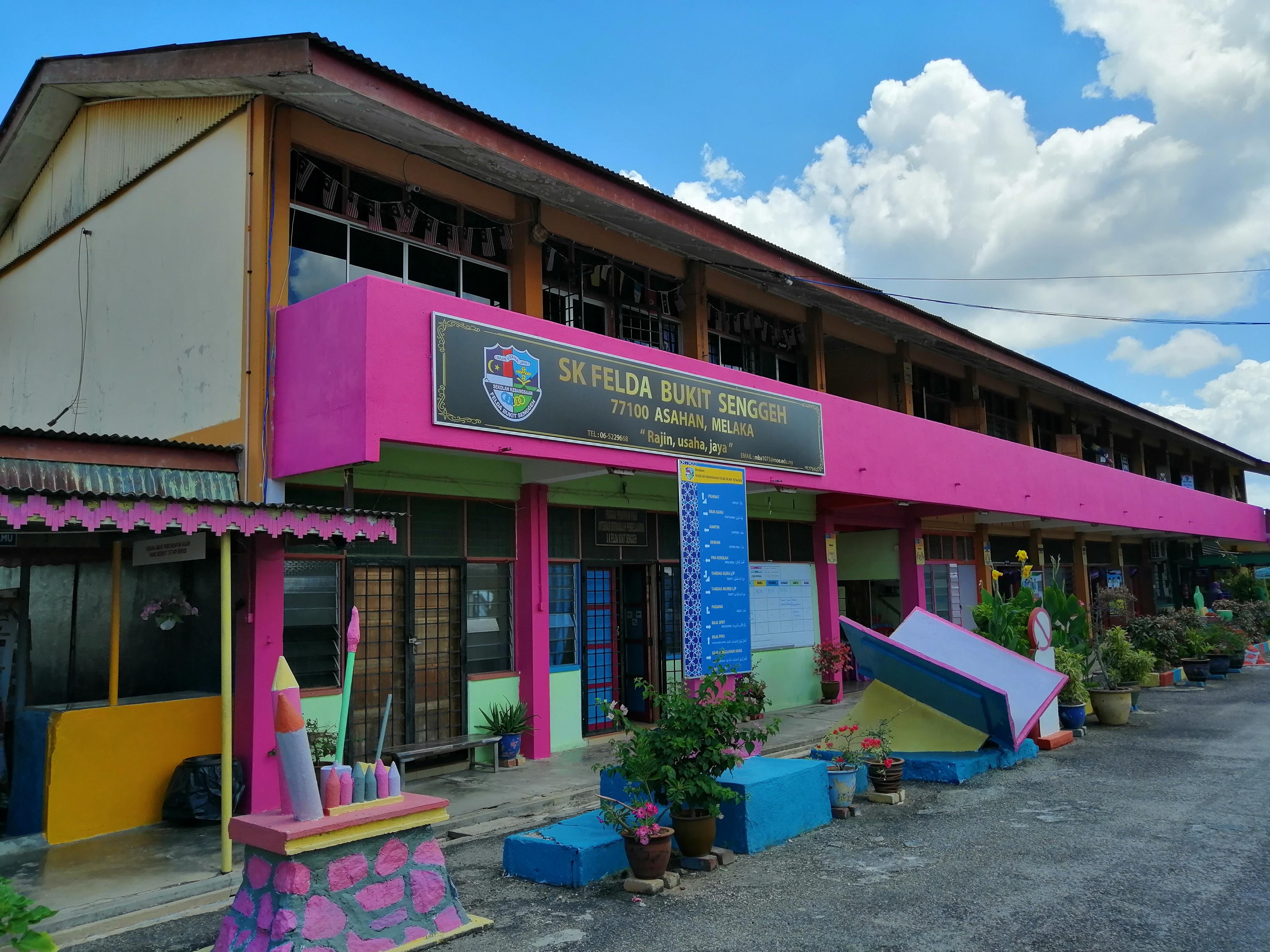 Gambar bahagian Blok A bertaraikh 13 Februari 2019